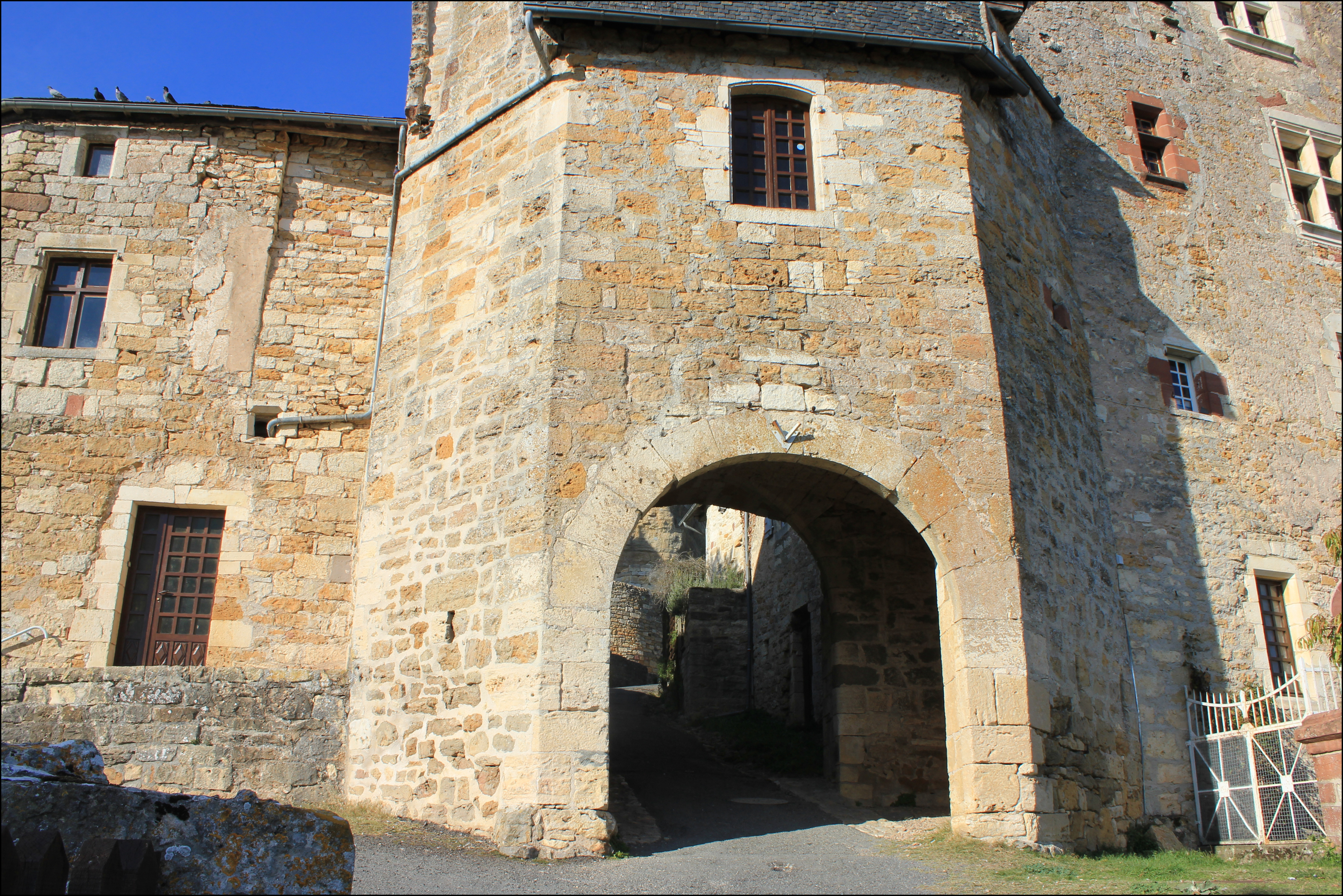 Turenne (19)